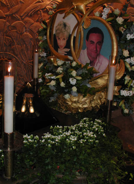 Lady-Di-Gedenkstein im Londoner Kaufhaus Harrods